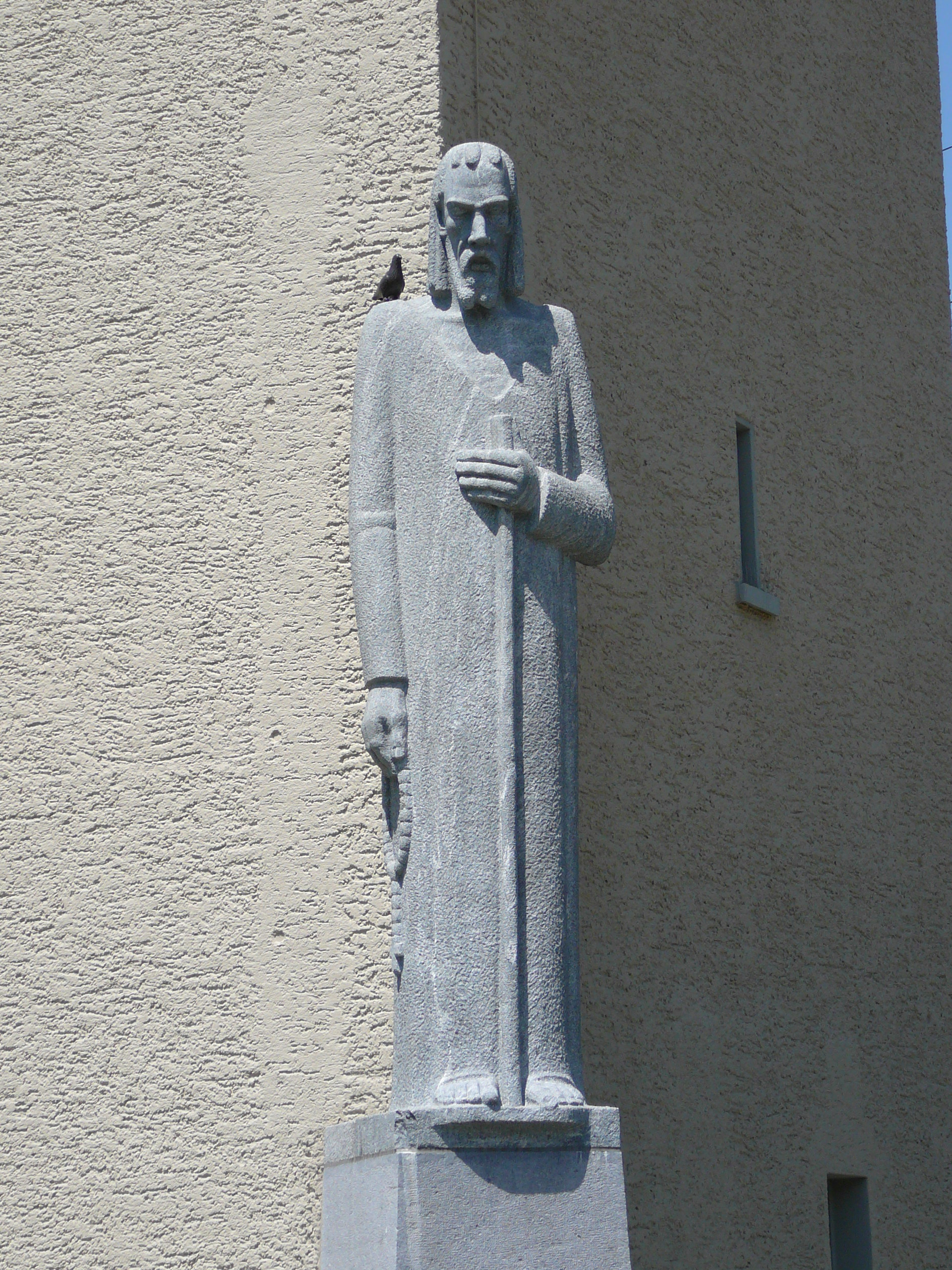 Römisch-katholische Kirche Bruder Klaus (Zürich-Unterstrass), Bruder-Klaus-Statue am Kirchturm